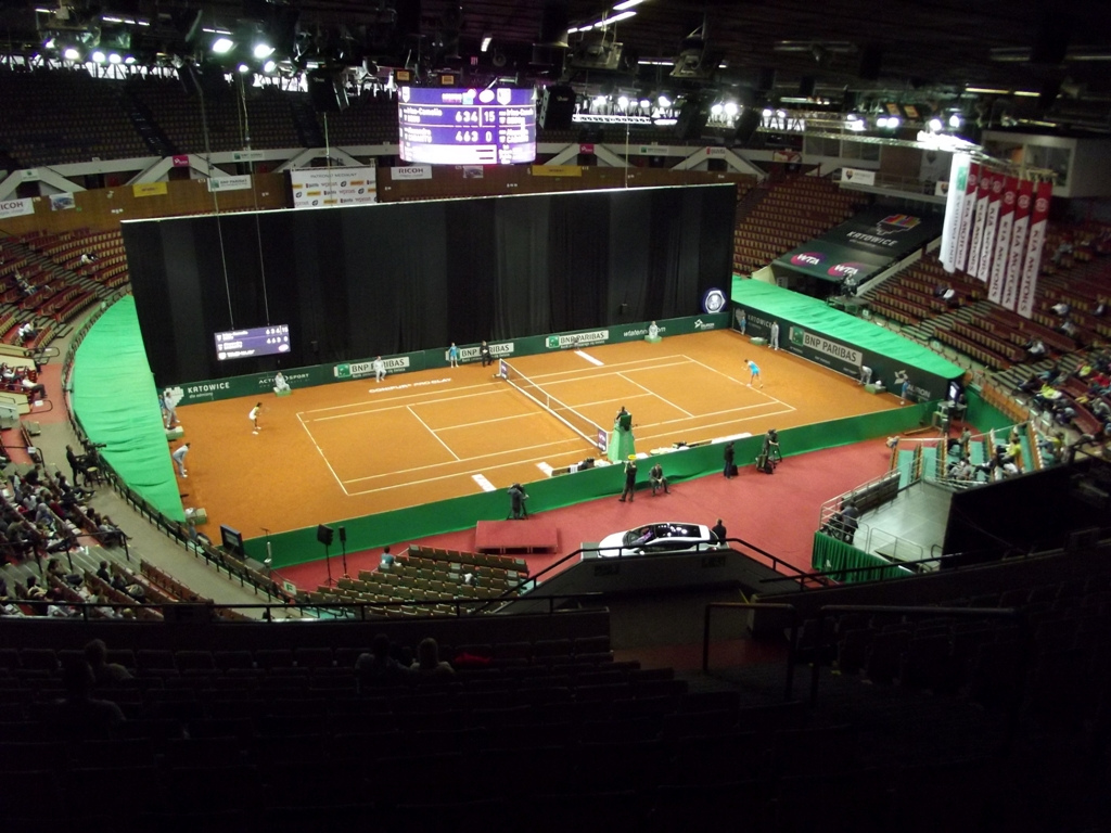 Zdjęcie zrobione podczas kobiecego turnieju tenisowego BNP Paribas Katowice Open, w katowickim Spodku.